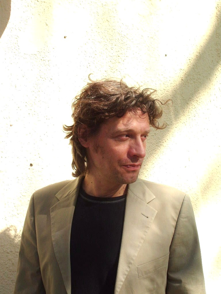 Benjamin Völz nach einem Interview in Berlin im April 2010